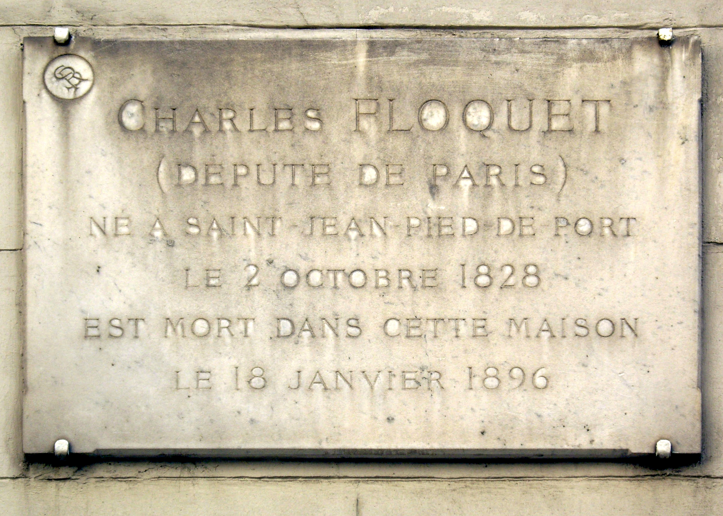 Plaque apposée au n° 19 de la rue de Lille, Paris 7e, où mourut l'homme politique Charles Floquet (1828-1896) le 18 janvier 1896.